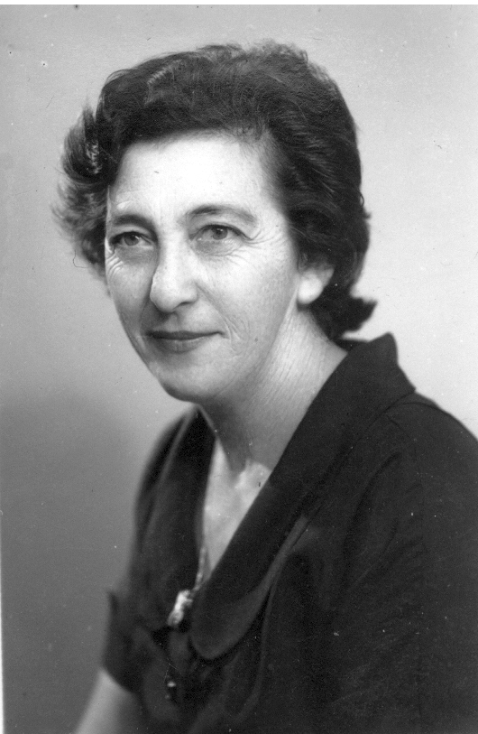 היא ממפקדות בית"ר ולוחמות אצ"ל. הייתה מאסירות אצ"ל שנכלאו על ידי הבריטים בבית הסוהר לנשים בבית לחם. יקירת תל אביב.